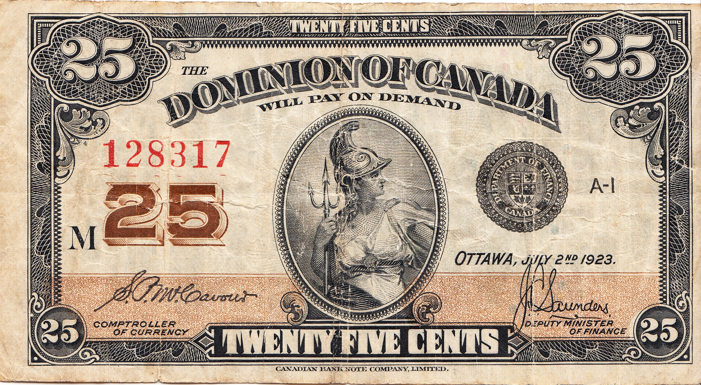 Billet canadien de 0,25$, troisième émission (1923)